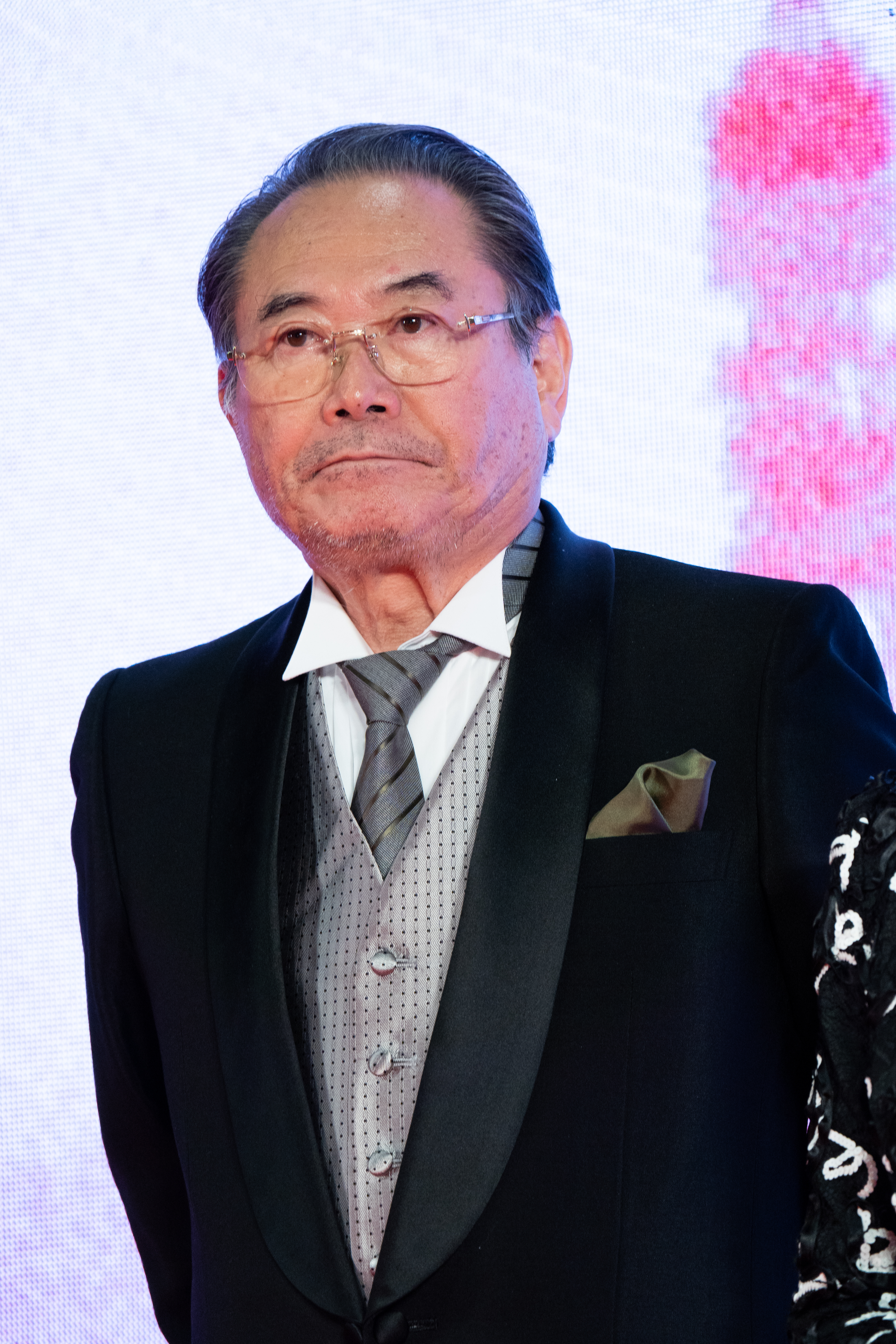 第32回 東京国際映画祭 オープニングセレモニー 前田吟 (男はつらいよ お帰り 寅さん)